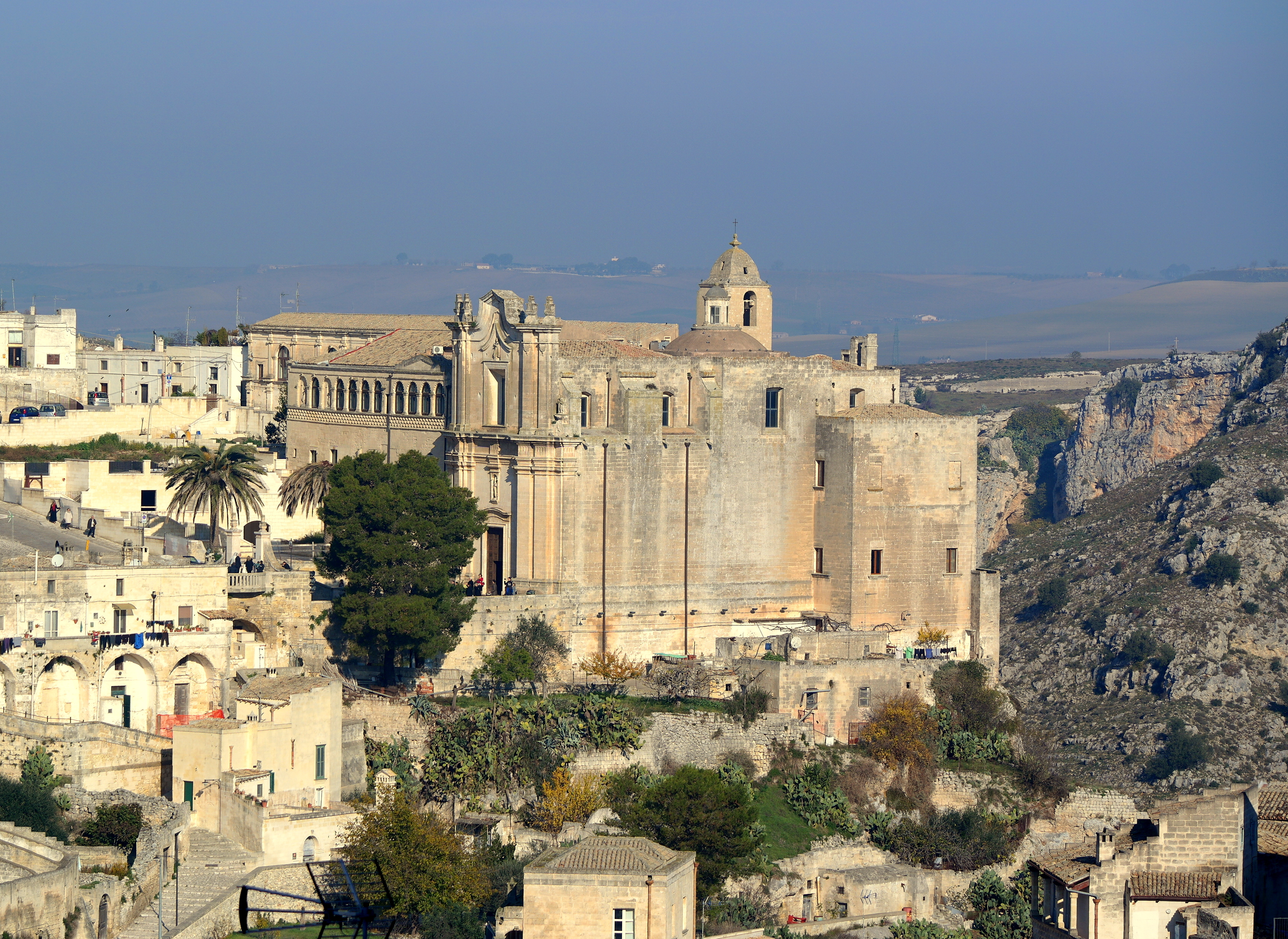 Convento di Sant'Agostino a Matera visto dalla Cattedrale